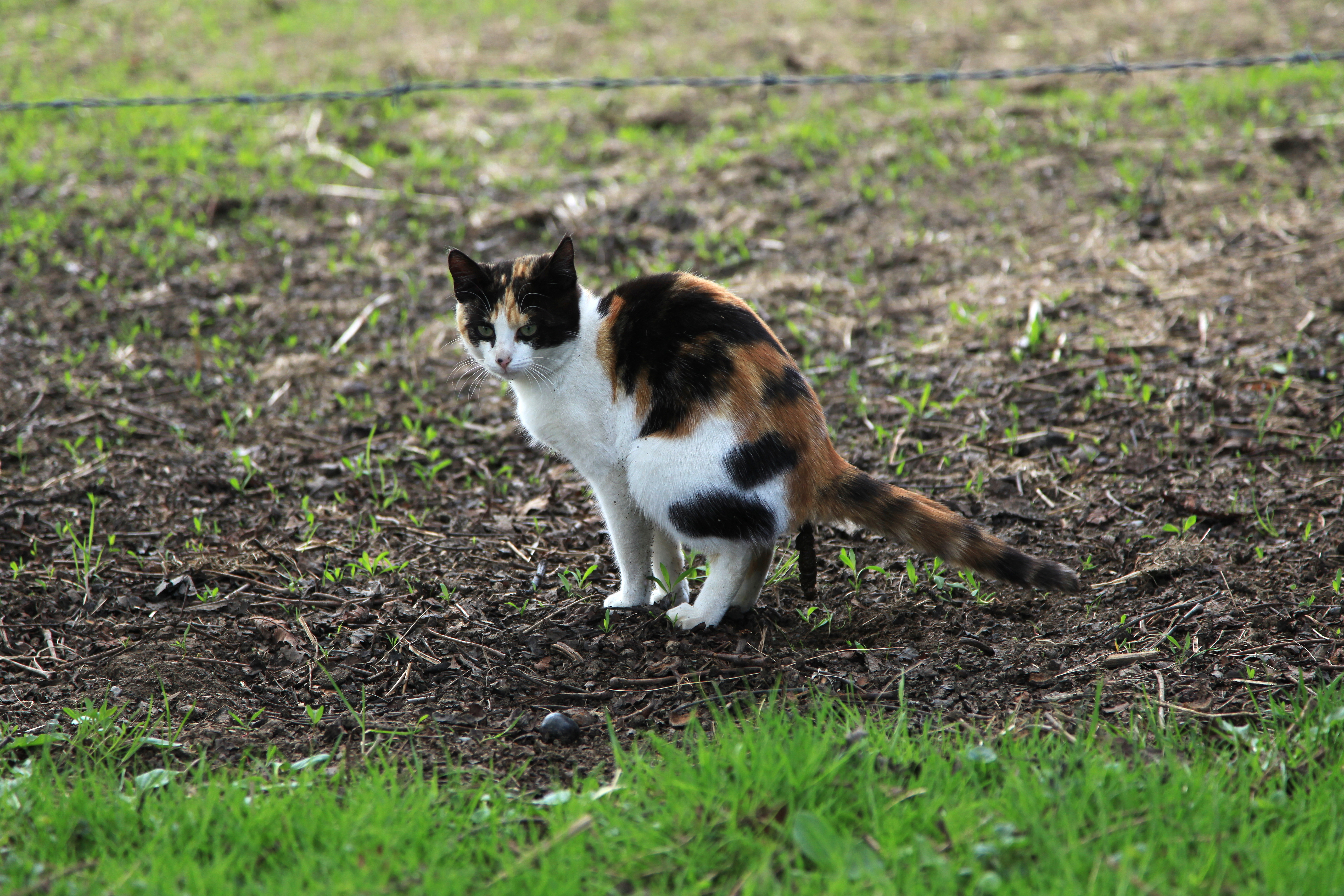 Schiff in Herrenstrunden, Bergisch Gladbach